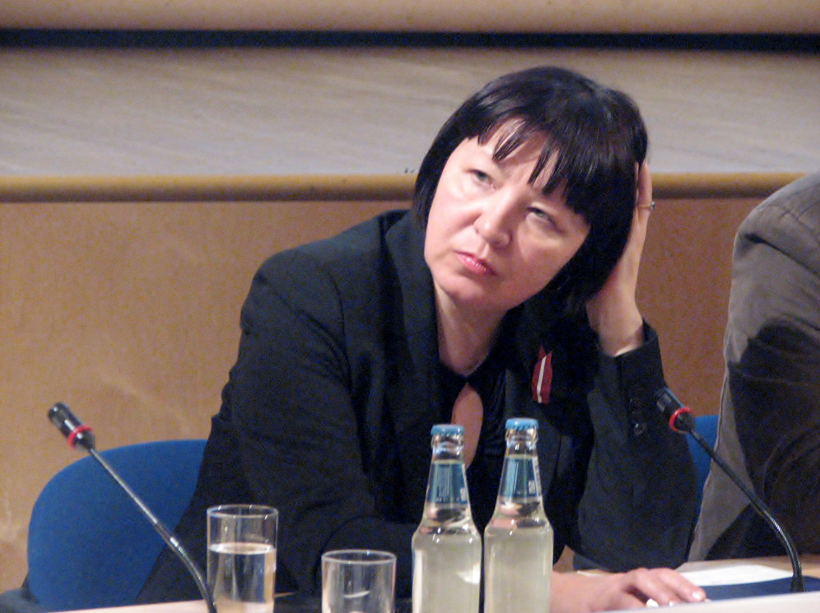 Liāna Langa esinemas Tallinna Raamatumessil toimunud Põhja- ja Baltimaade kirjandusfoorumil